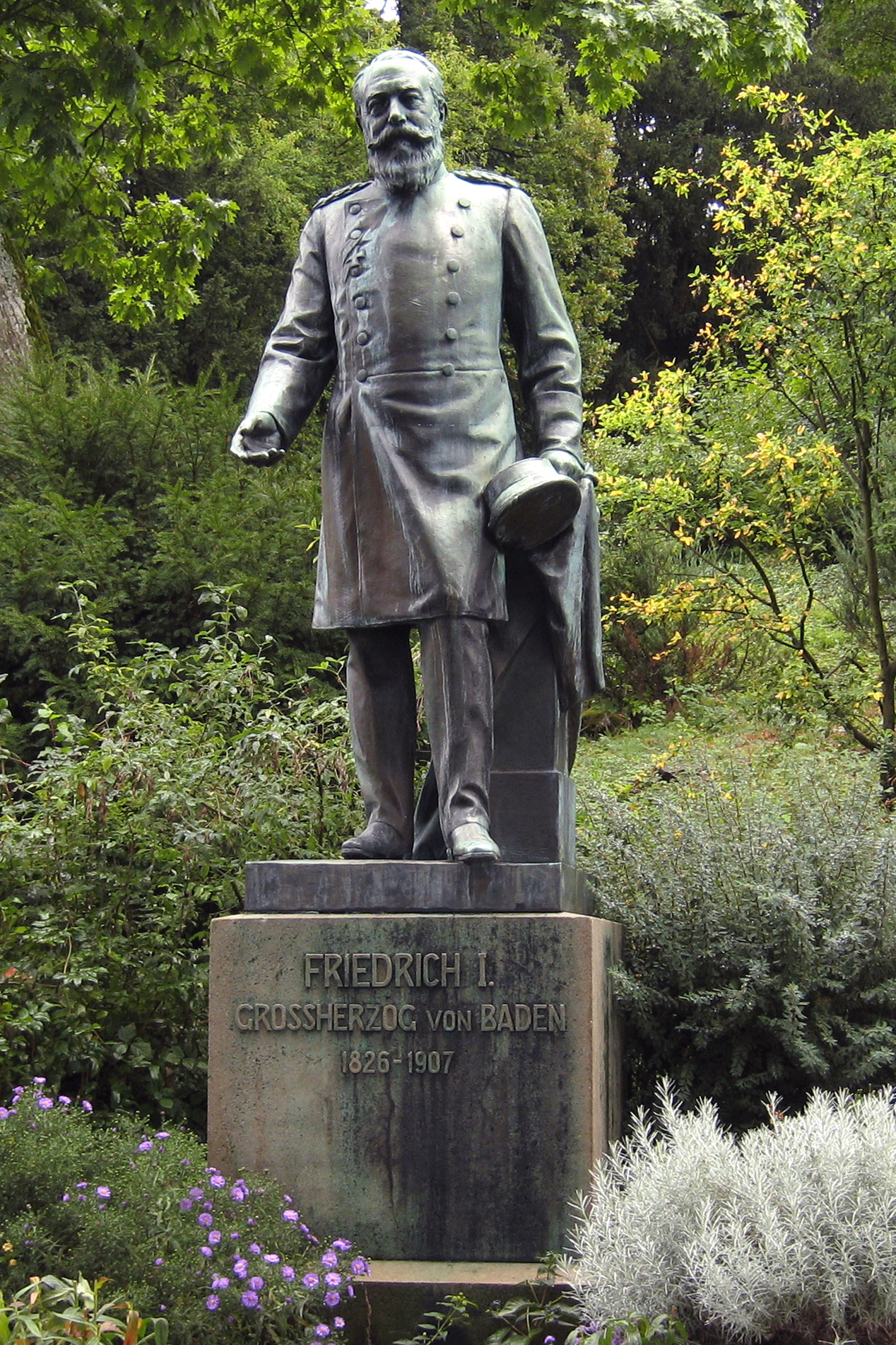 Denkmal für Großherzog Friedrich I. auf der Westseite des Burgberges in Badenweiler. Badenweiler/Süd-Schwarzwald/Deutschland